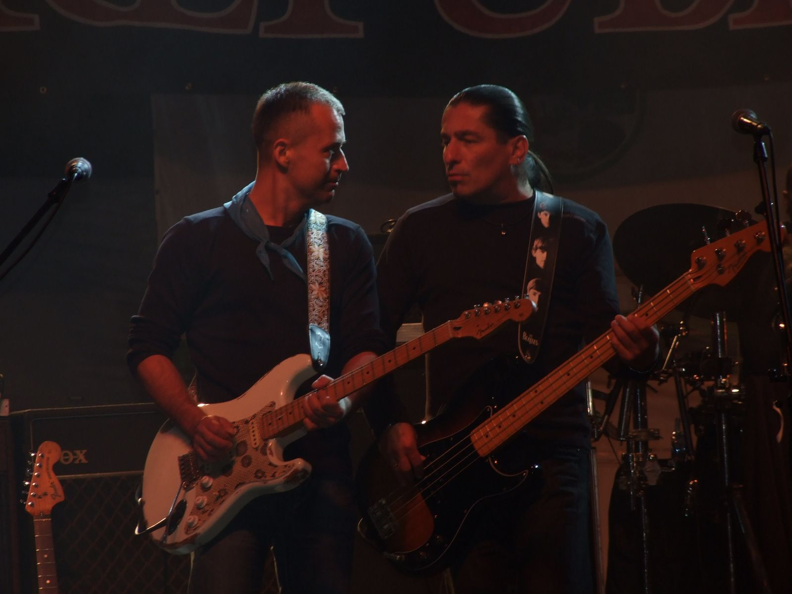 A Republic együttes koncertjén Patai Tamás gitáros és Boros Csaba basszusgitáros, 2010-ben a SzeptemberFeszt-en.